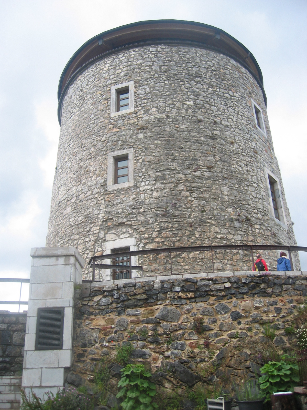 Torreon de Puebla de Lillo. Reconvertido en Casa del Parque.